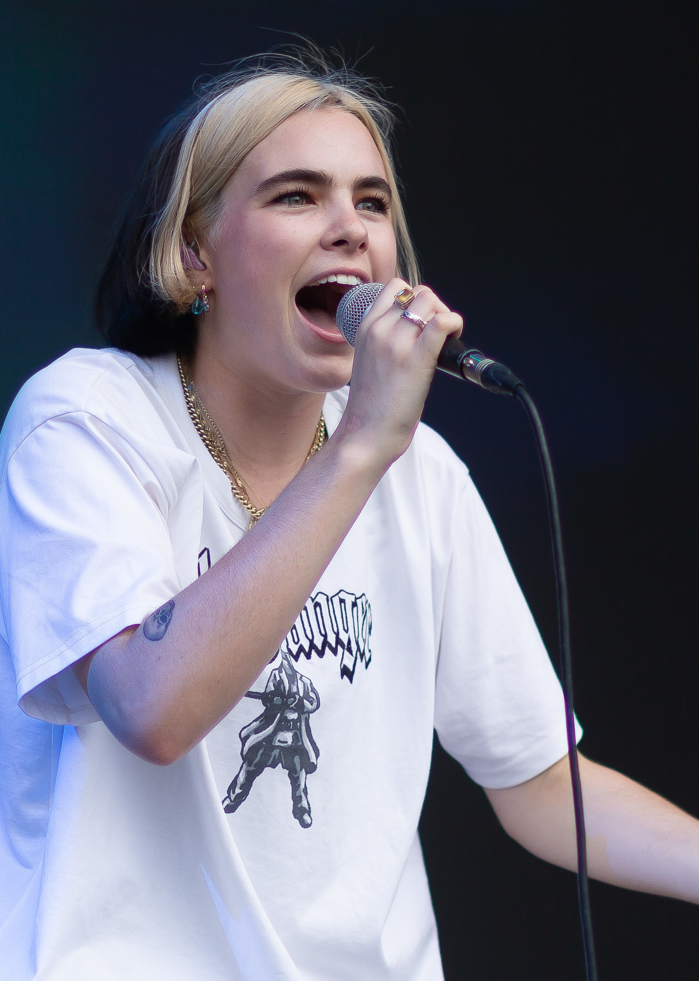 BENEE